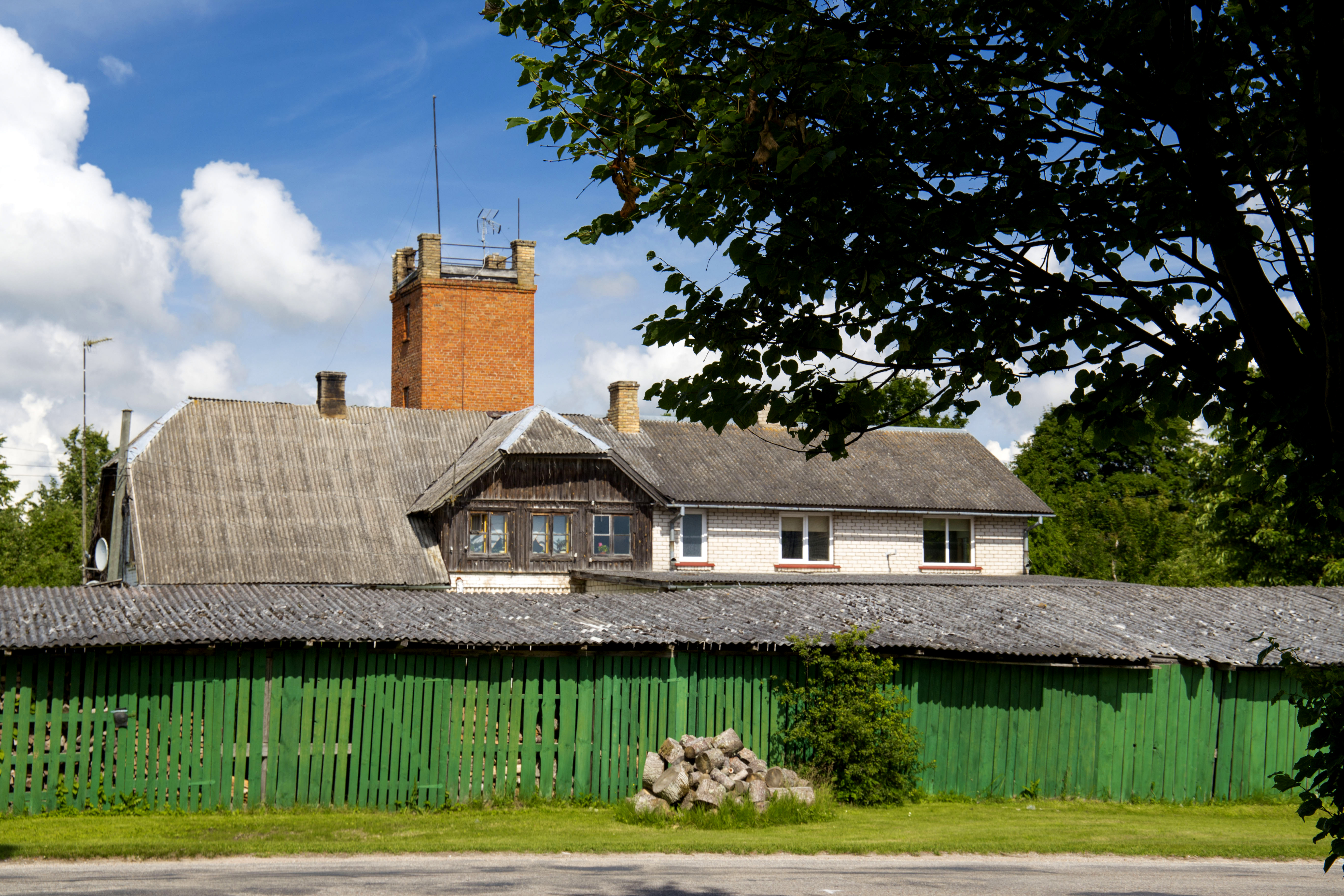 Vandzene